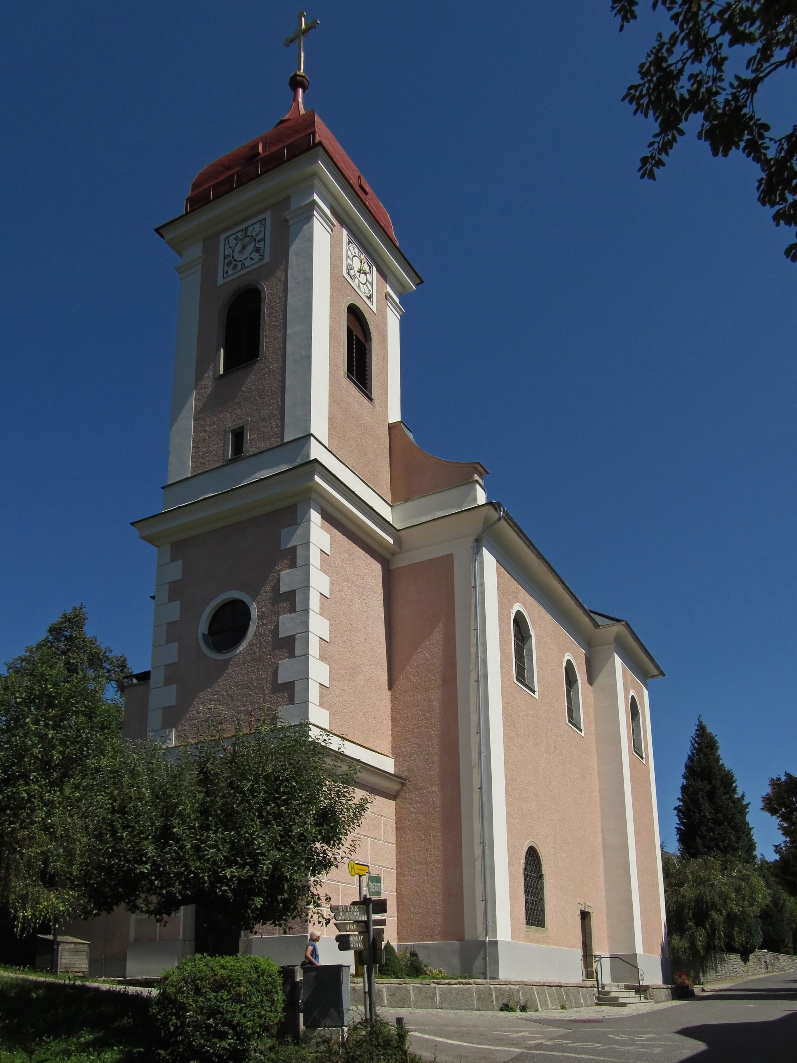 Die Pfarrkirche ist Sankt Urban geweiht. Der barocke Saalbau mit Rundapsis und vorgestelltem Westturm von 1840 liegt leicht erhöht inmitten des Ortes. Das Langhaus mit querschiffartiger Erweiterung und Chor unter gemeinsamem Dach ist durch Putzlisenen gegliedert und ist durch eingezogene Rundbogenfenster und ein südliches Rechteckportal mit Keilstein durchbrochen. Der vorgestellte, dreigeschossige Westturm mit profilierten Gesimsen ist im Erdgeschoß mit Putzquaderung ausgestattet, hat im zweiten Geschoß eine Ortsteineinfassung und im Glockengeschoß mit Eckpilastern, rundbogigen Schallfenstern und Haubendach. Östlich des Chors liegt ein Sakristeianbau. Das östliche Joch des dreijochigen Langhauses ist querschiffartig verbreitert. An das Langhaus anschließend liegt ein einjochiger, leicht eingezogener Chor mit Halbkreisapsis, der durch ein Kreuzgratgewölbe über gekuppelten auf flacher Pilaster- bzw. Doppelpilastergliederung mit umlaufendem Gesims gedeckt ist. Zur Ausstattung der Kirche zählen neben dem mit 1736 bezeichneten Hochaltar unter anderem auch zwei Seitenaltäre, ein prunkvoller Tempiettotabernakel, ein mit 1715 bezeichneter Opferstock, Heiligenstatuen und andere Kunstwerke.